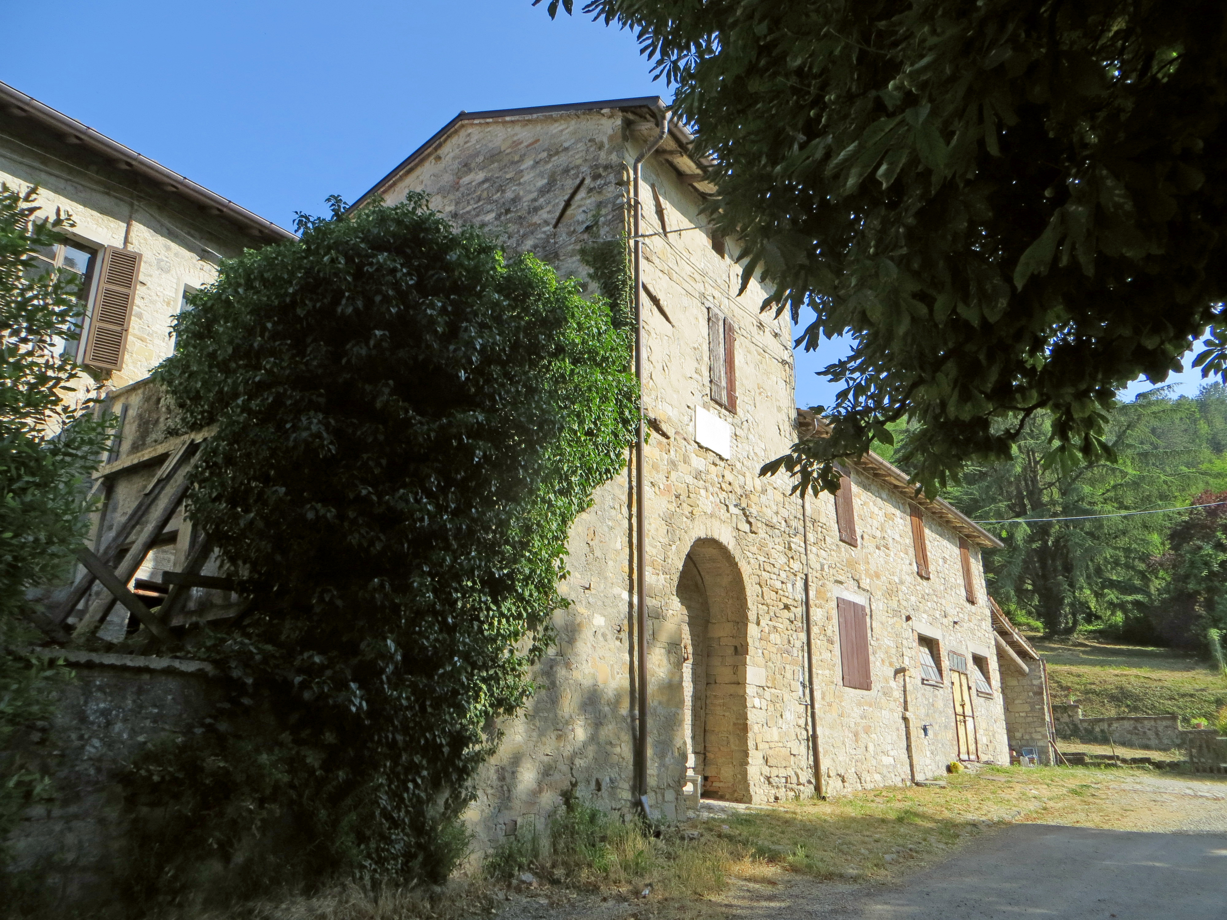 Abbazia di San Basilide (San Michele Cavana, Lesignano de' Bagni) - facciata del monastero This is a photo of a monument which is part of cultural heritage of Italy.